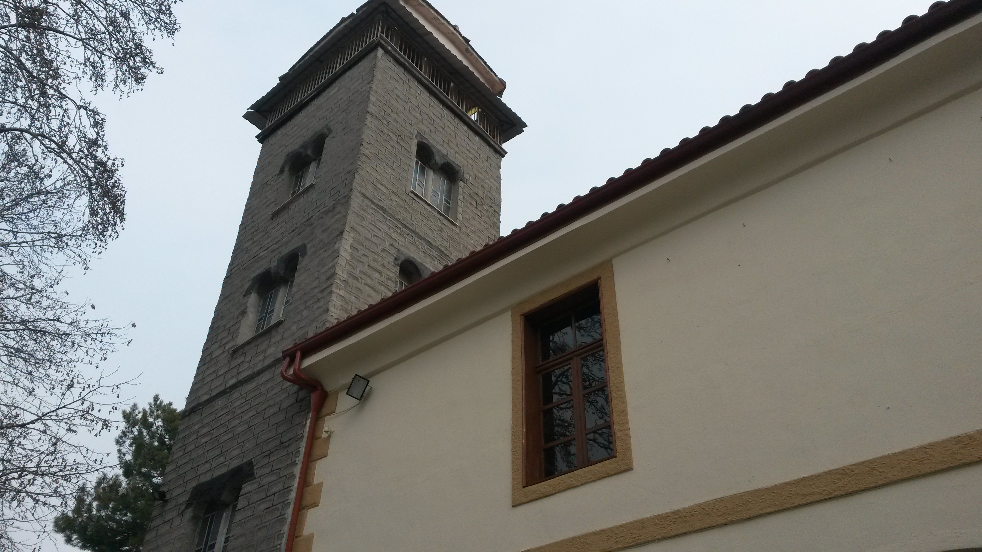 Ο ναός Κοιμήσεως της Θεοτόκου εξωτερικά.